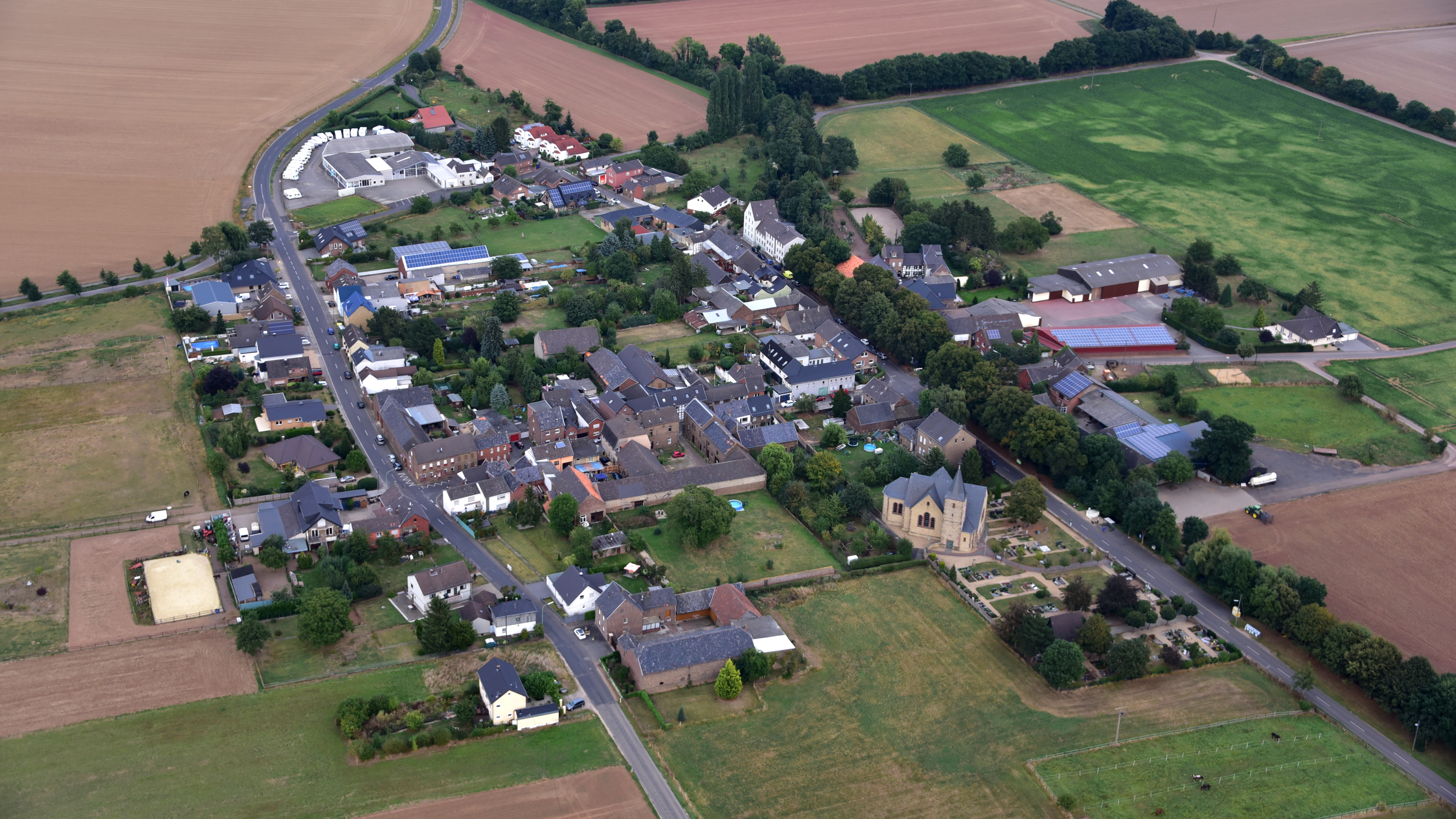 Lövenich (Zülpich), Luftaufnahme (2016)